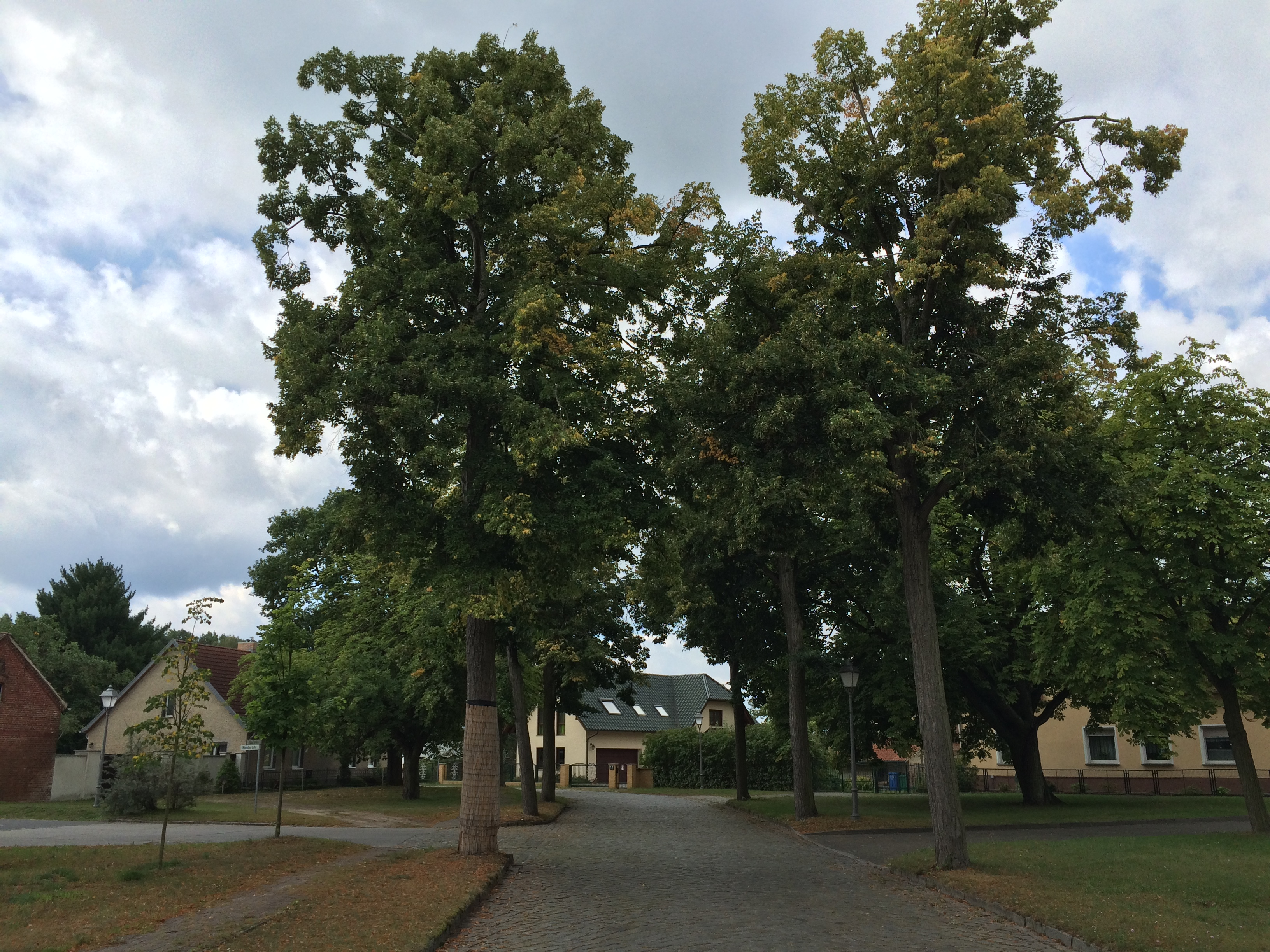 Pätz, ein Ortsteil der Gemeinde Bestensee im Landkreis Dahme-Spreewald in Brandenburg